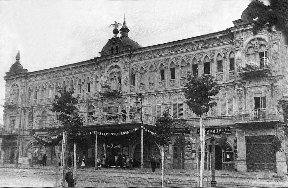 Ростов на Дону кафе Марс Дом К.В. Чарахчианца